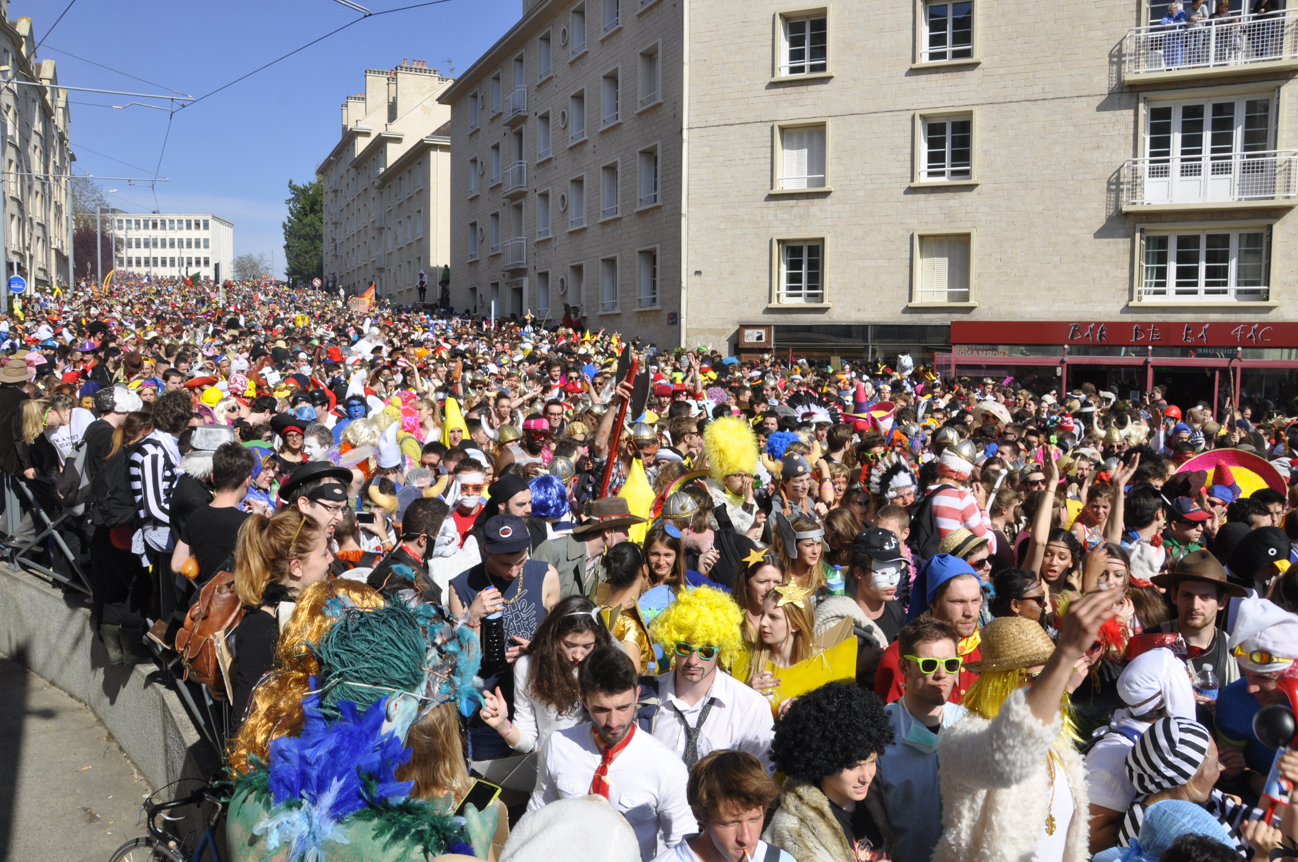 Édition 2014 du carnaval étudiant de Caen (Calvados, France).